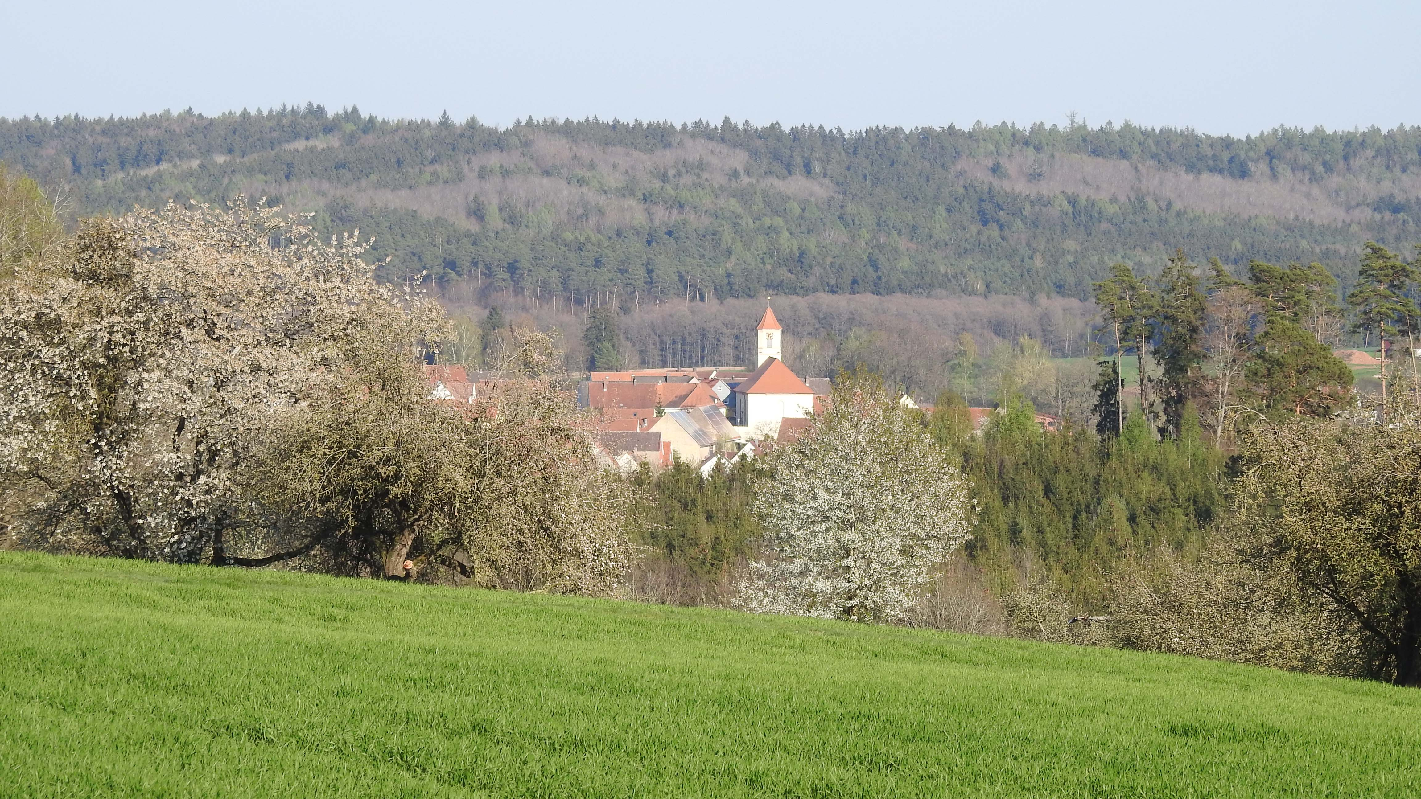 Fürnheim, Wassertrüdingen, von Westen